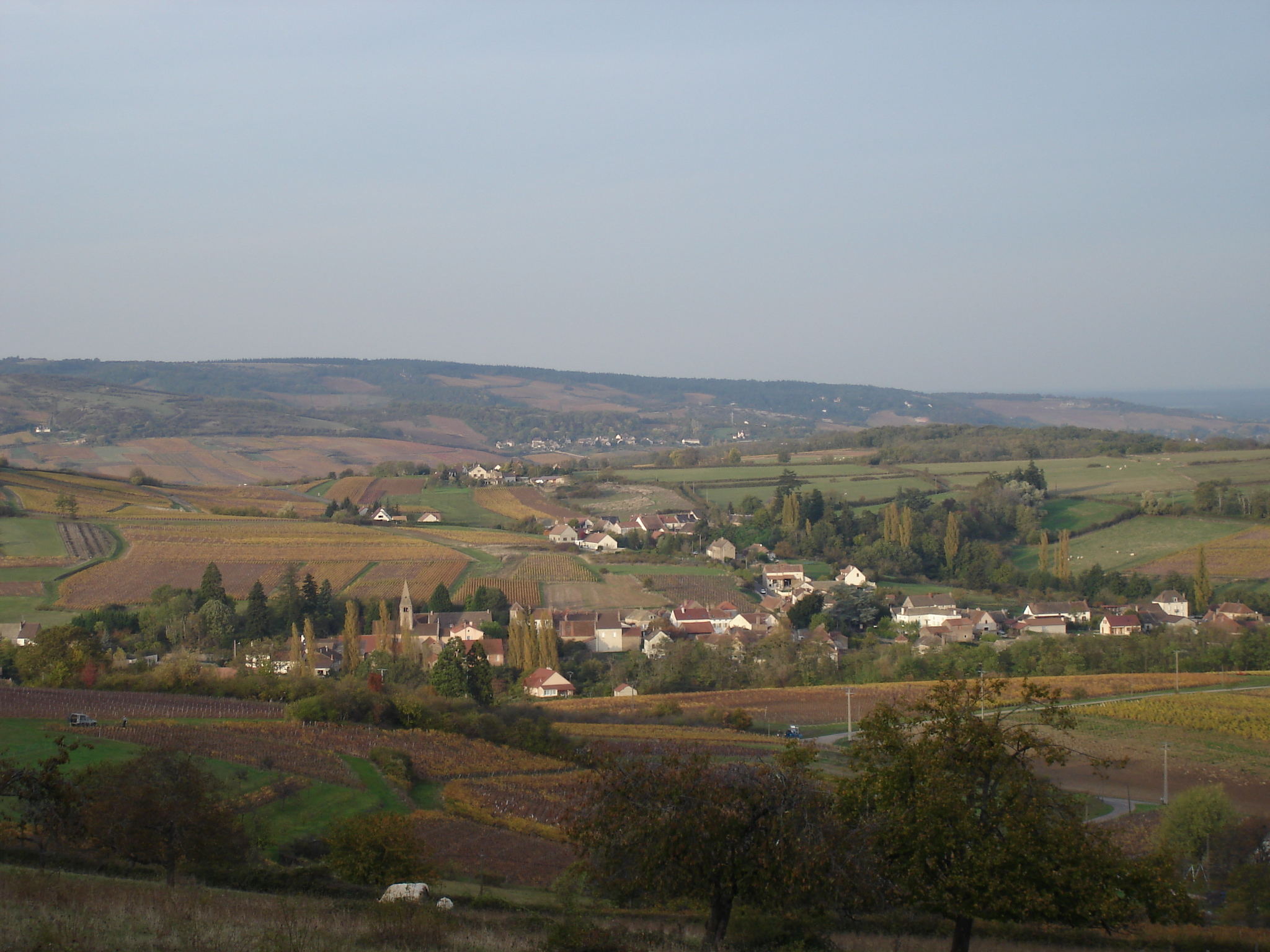 Vue générale sur Bissey-sous-cruchaud, village de Saône-et-Loire, région Bourgogne, en france